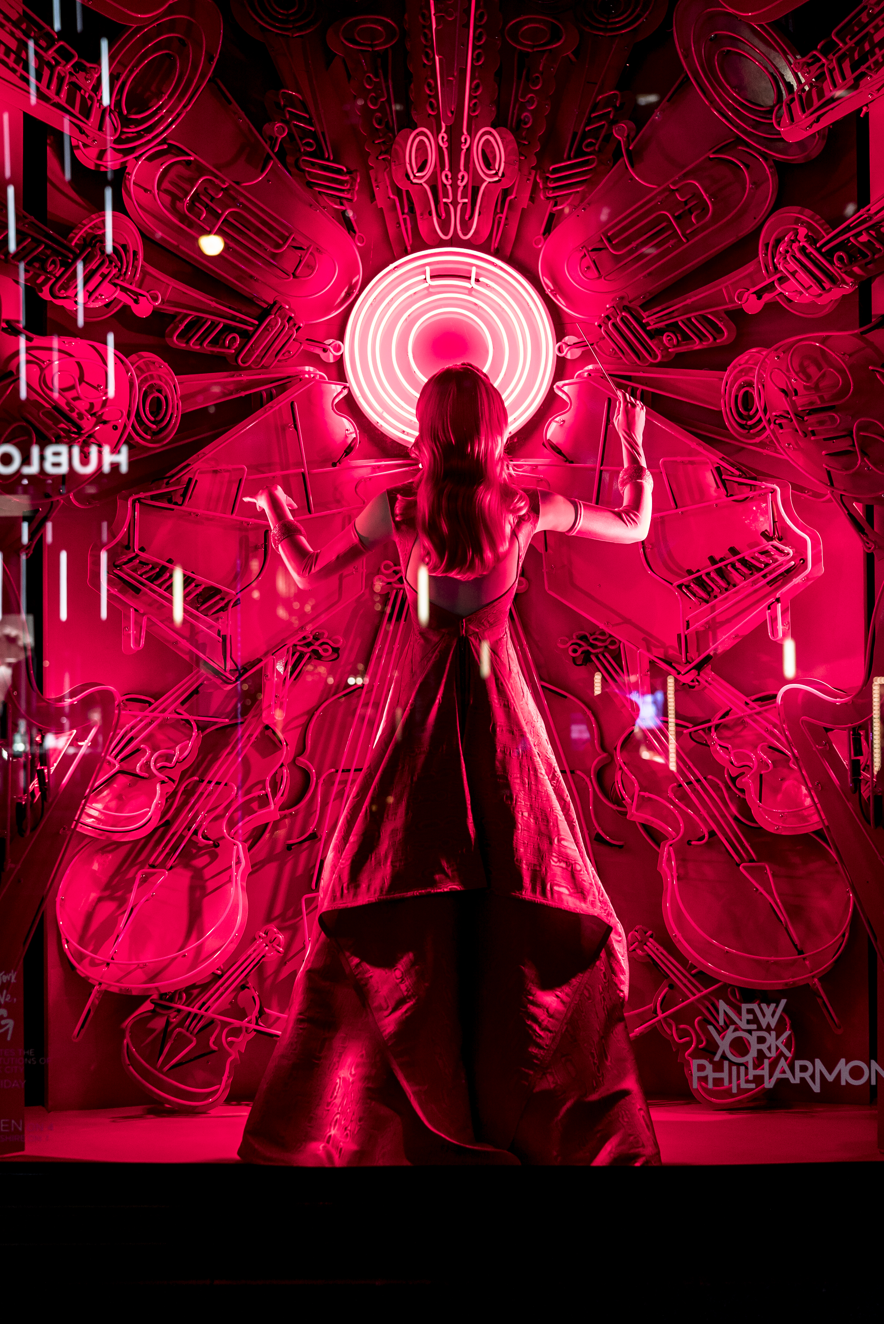 Looks a bit like an oven.